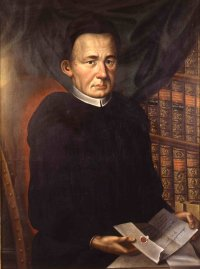 Karl Meichelbeck (1669-1734). Bayerischer Benediktinerpater, Historiograph.